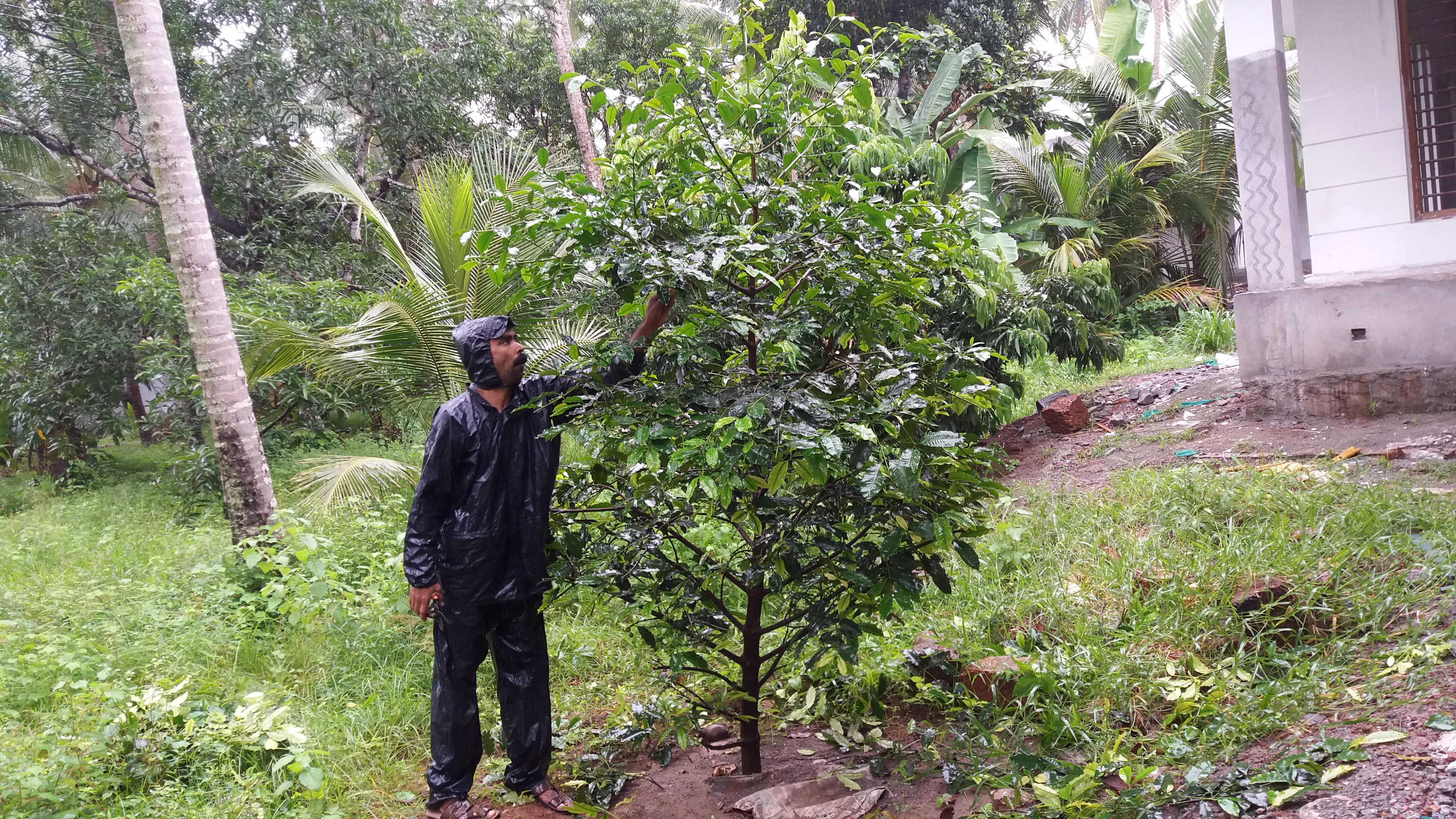 പ്രൂണിങ്ങ് ചെയ്യുന്ന ഒരു ബറാബ മരം.ഇംഗ്ലീഷ് നാമം Lemon drop mangosteen ശാസ്ത്രീയ നാമം Garcinia intermedia കുടുംബം Clusiaceae.